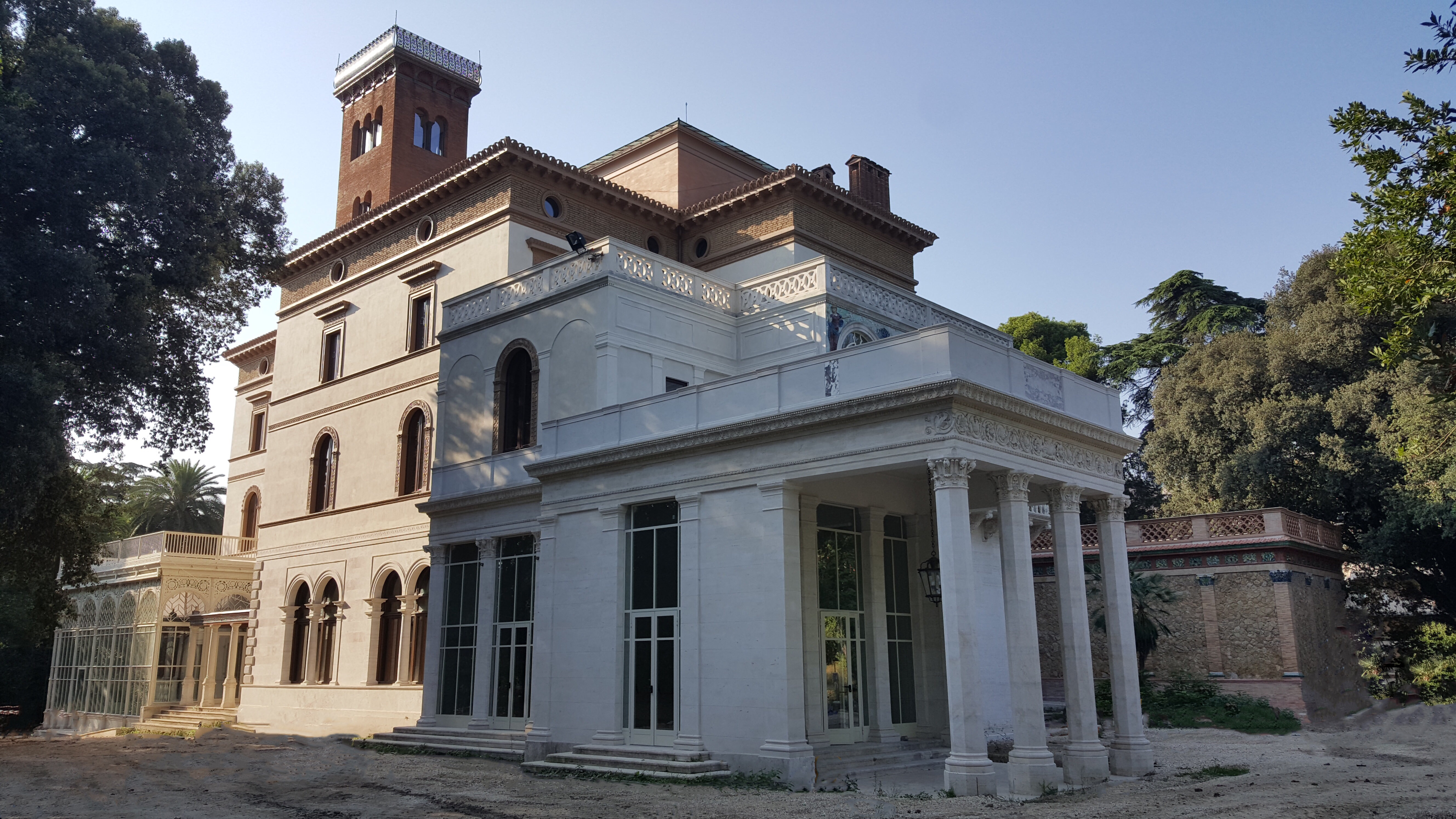 Villa Blanc ristrutturata dalla LUISS, lavori quasi terminati, agosto 2016